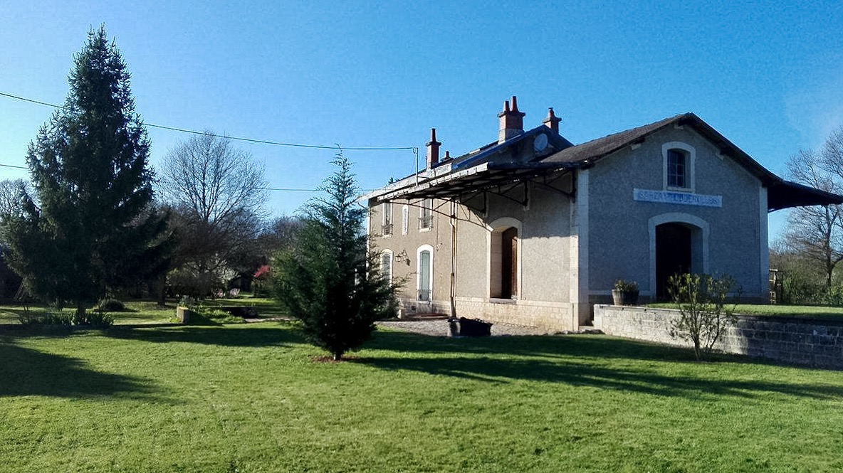 Gare de Sarzay-Fougerolles (Indre)